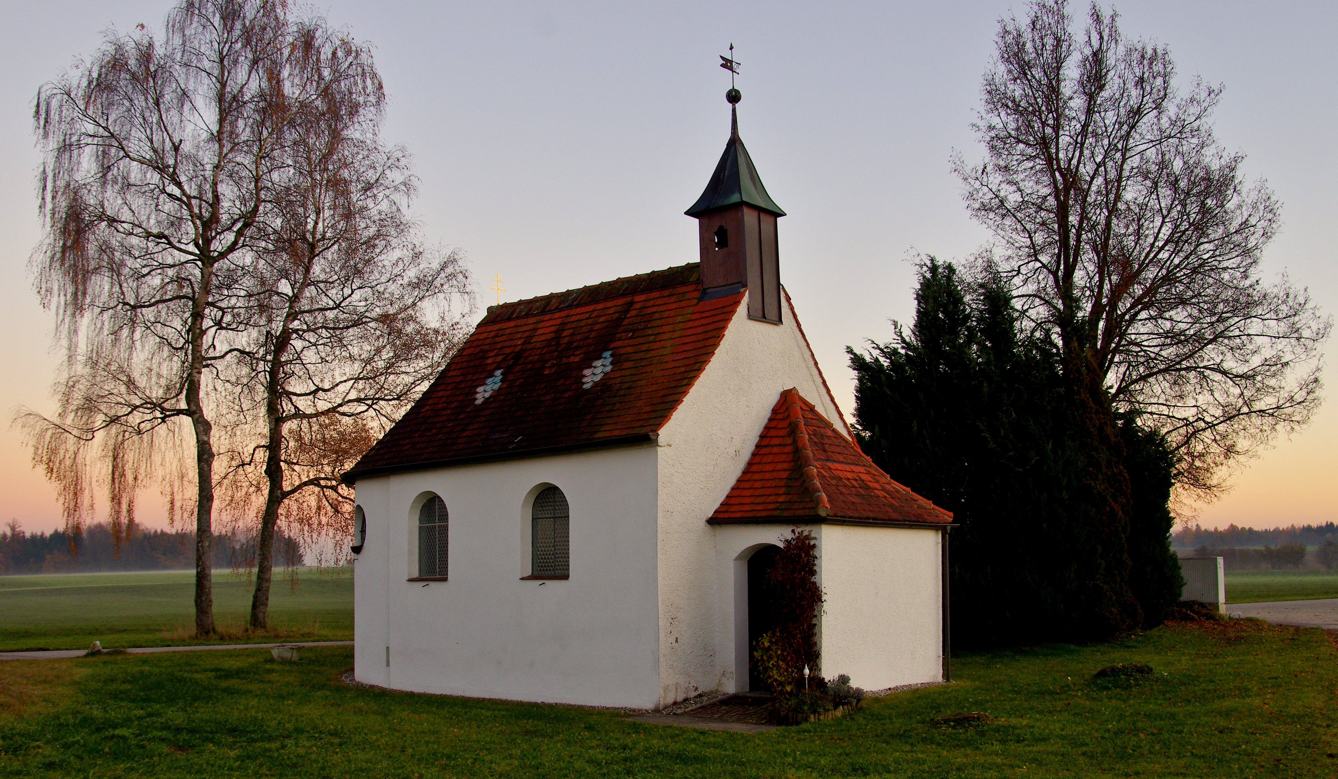 Die Kapelle St. Martin auch zum gegeißelten Heiland